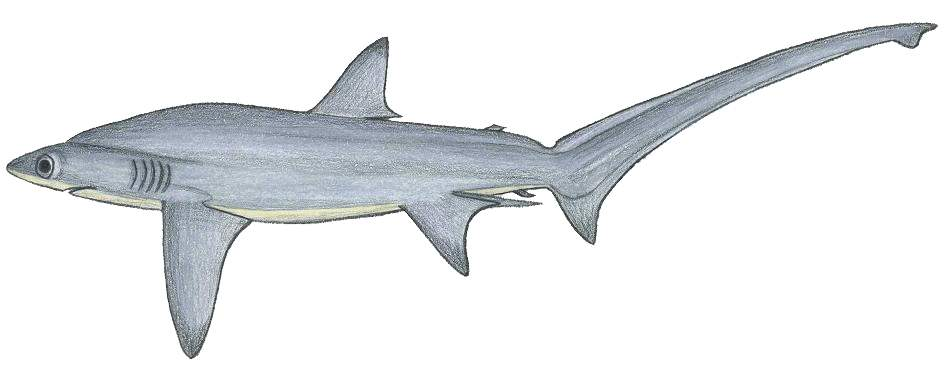 Alopias superciliosus